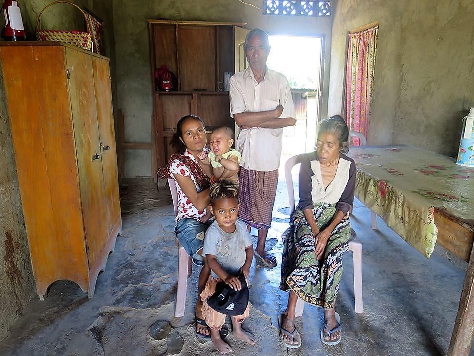 In einer Hütte in Matata